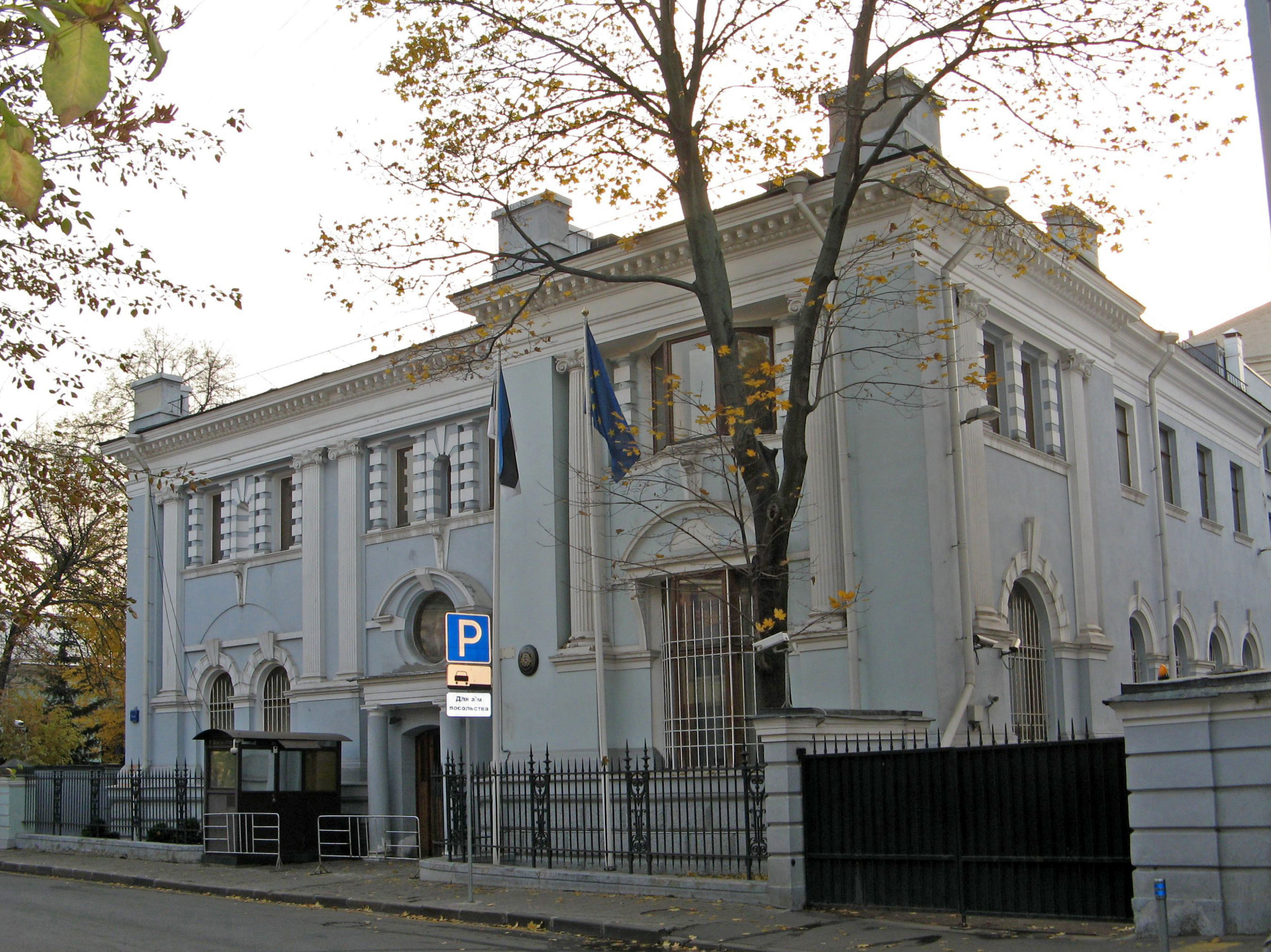 Жилой дом (дом Думнова): Кисловский М. пер., дом 5/8А, Пресненский, Центральный округ, Москва